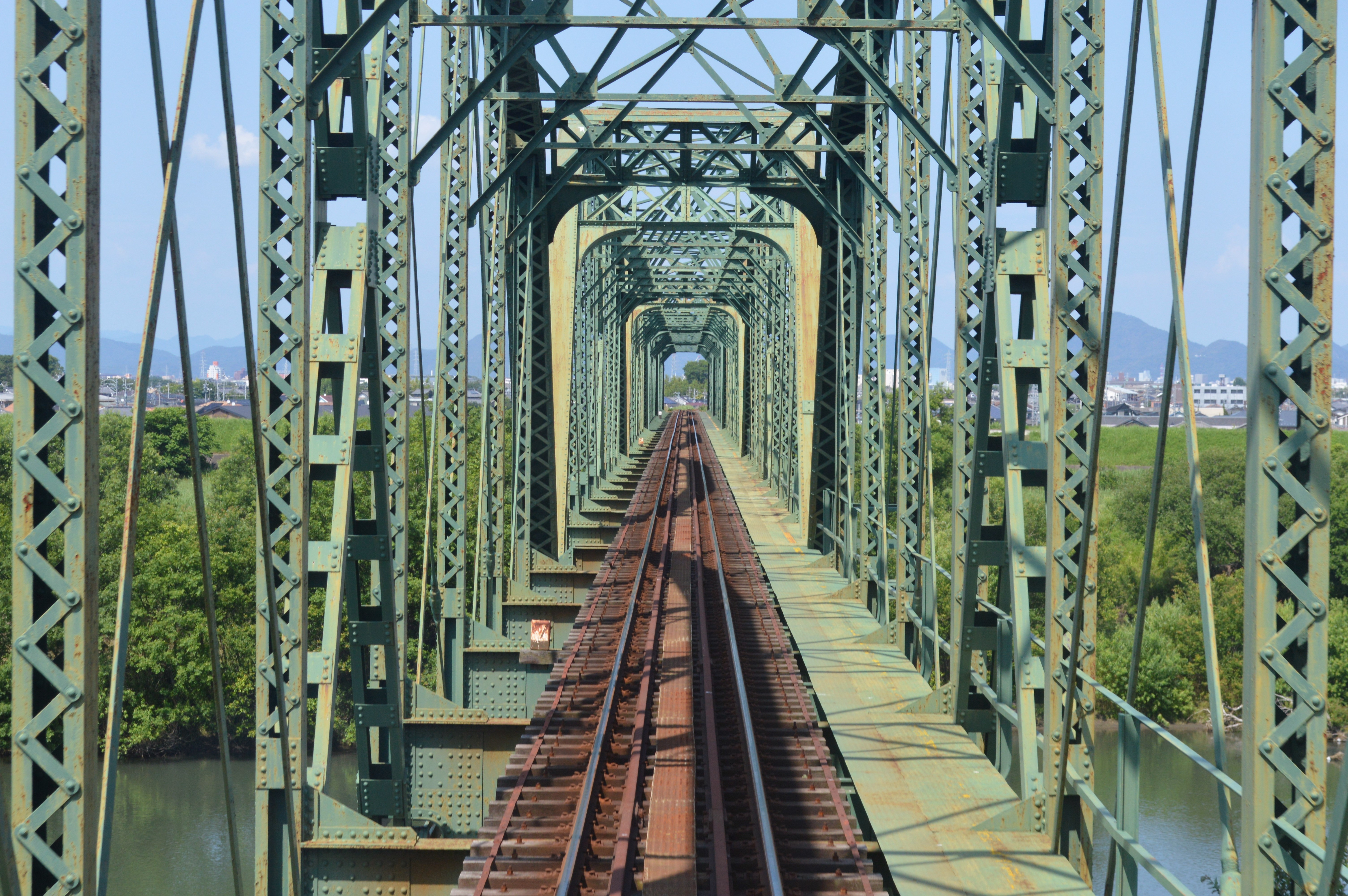 揖斐川に架かる樽見鉄道樽見線の揖斐川橋梁。岐阜県大垣市と安八郡安八町を結んでいる。